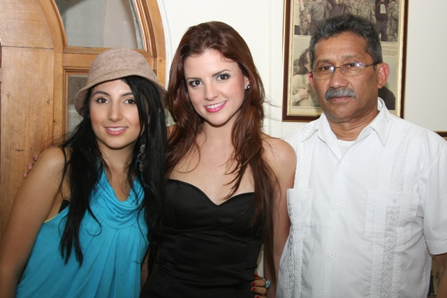 foto de sara tunes en neiva